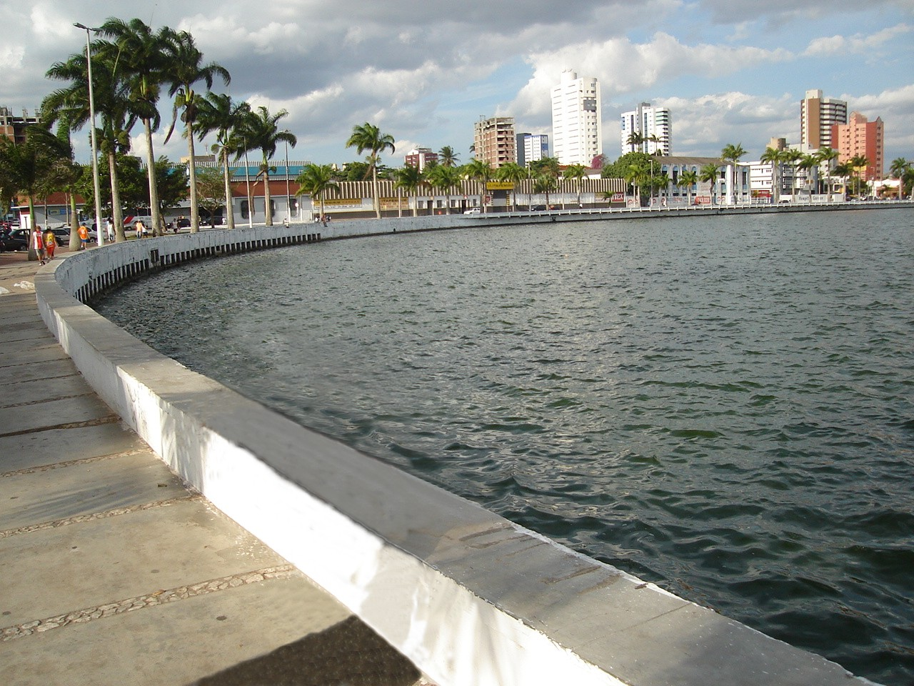 Açude Velho, Campina Grande - PB. Ano: 2006.